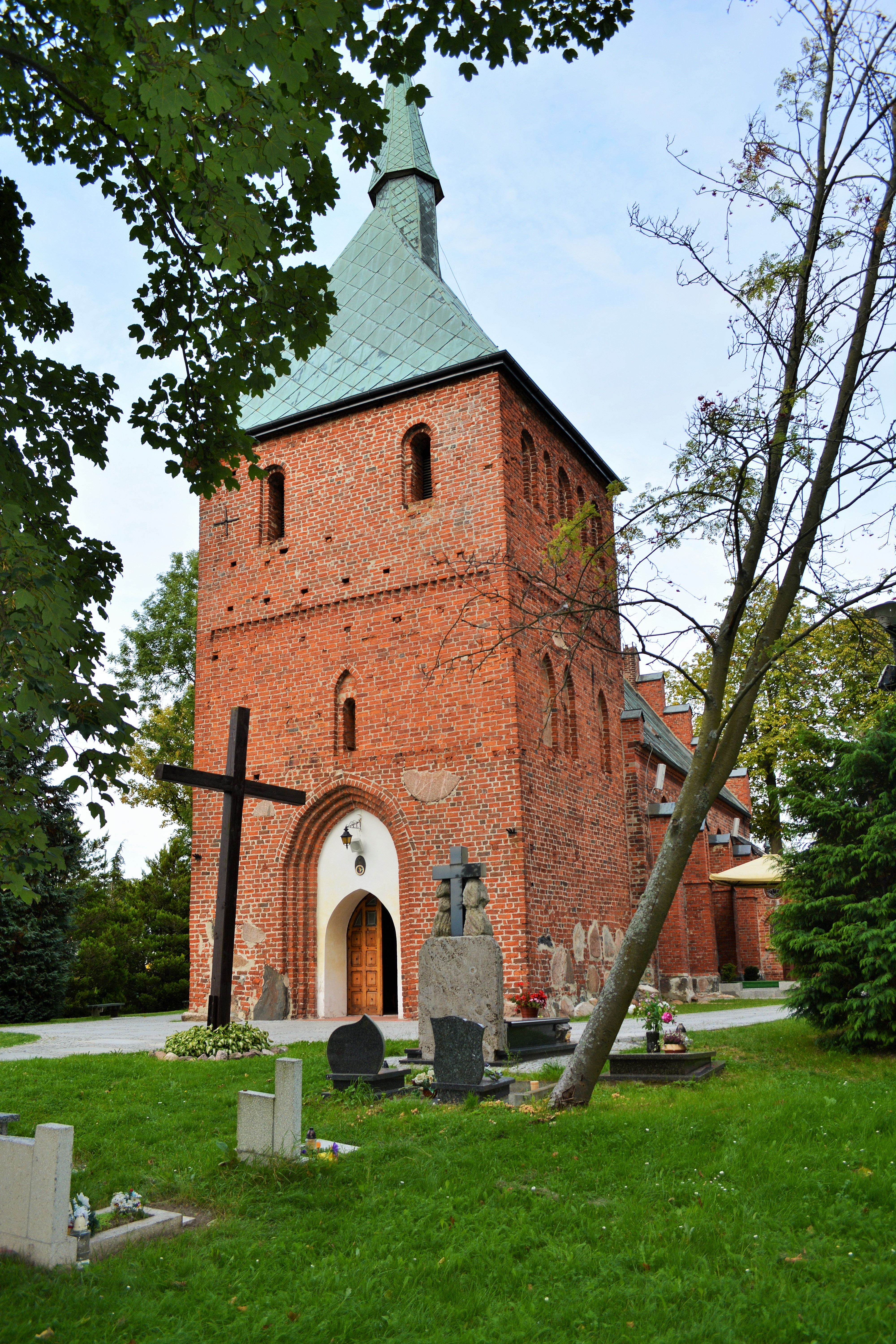 Verklärungskirche der katholischen Gemeinde in Mielno, Kreis Koszalin